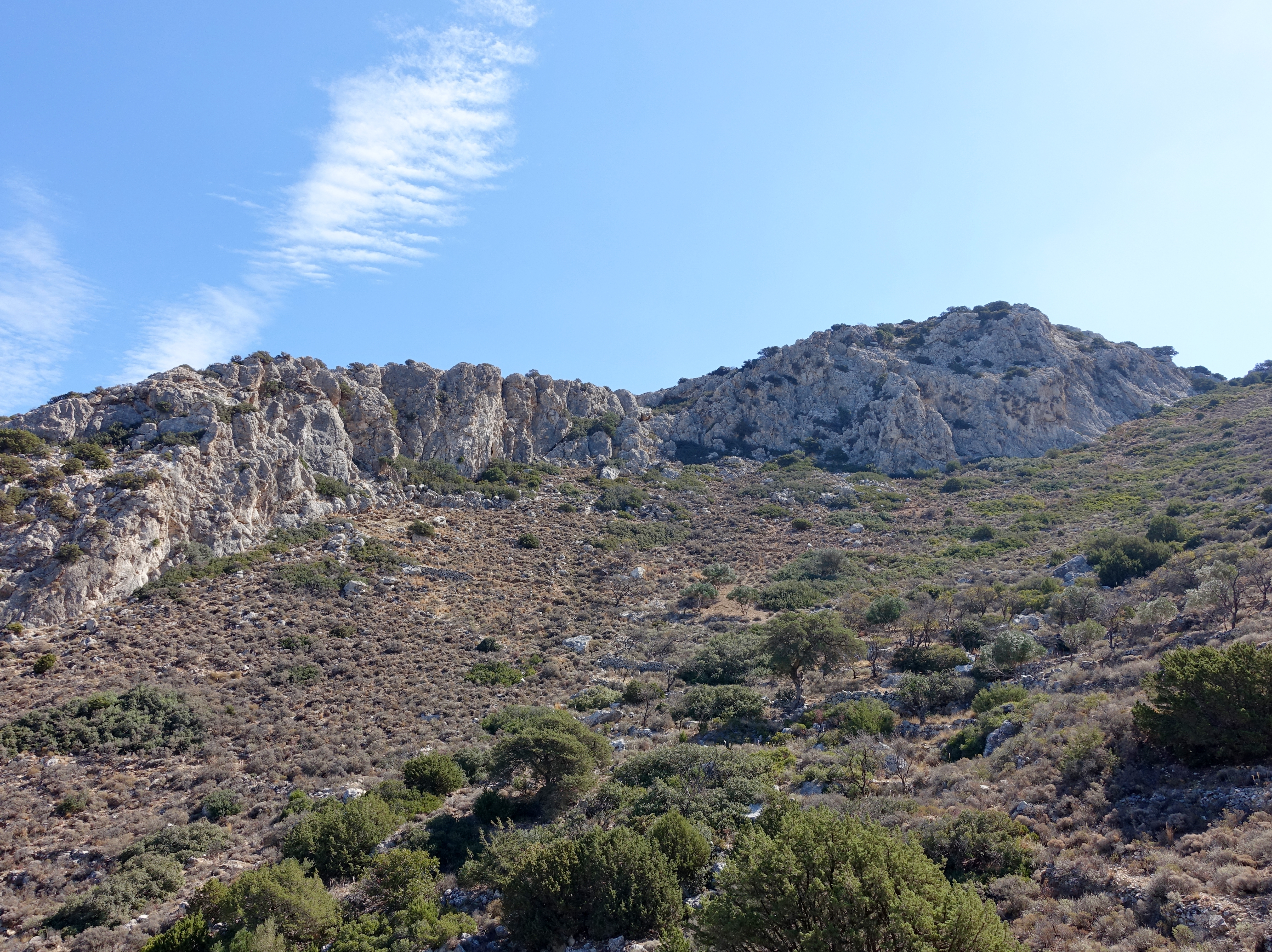 Lage der Ausgrabungsstätte von Vrokastro (Βρόκαστρο) bei Istro, Gemeinde Agios Nikolaos, Kreta, Griechenland